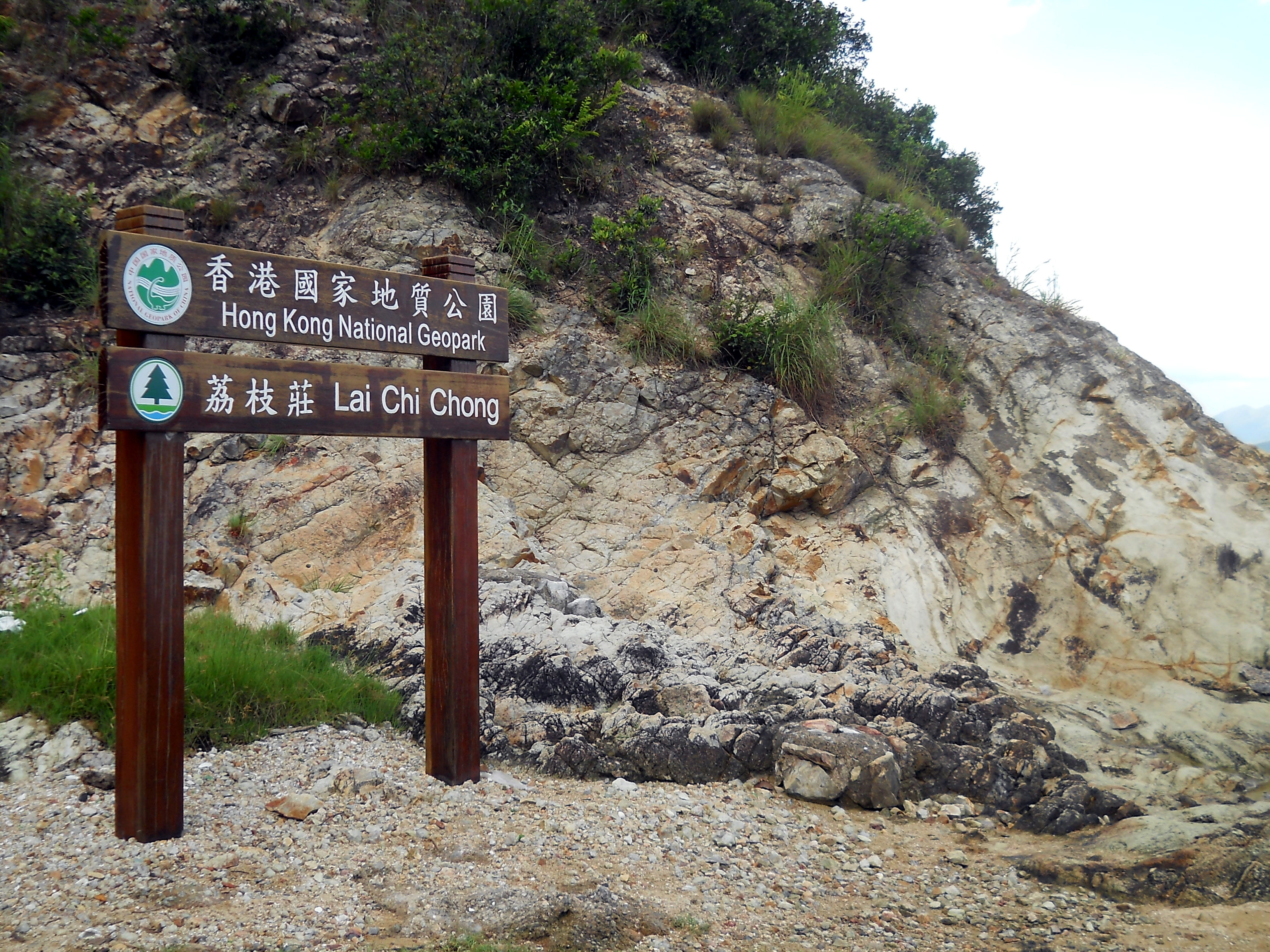 中文（香港）: 香港國家地質公園赤門景區荔枝莊